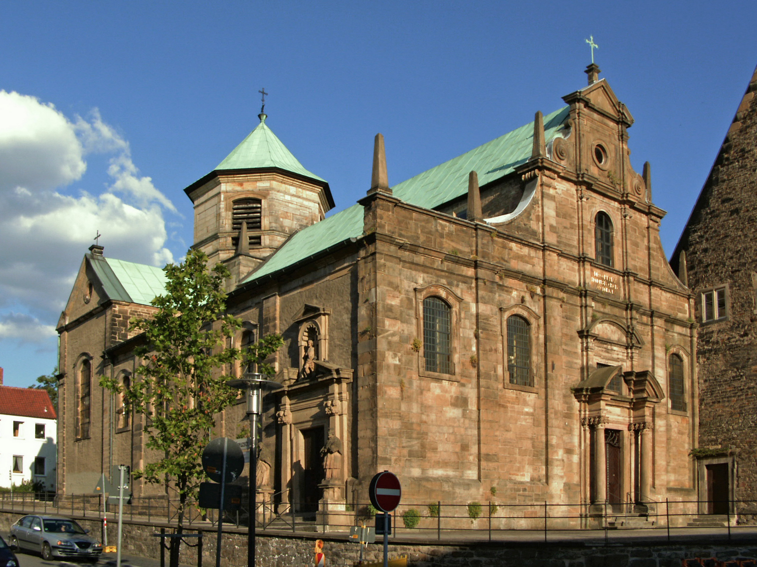 Katholische Kirche Zum Heiligen Kreuz in Hildesheim.